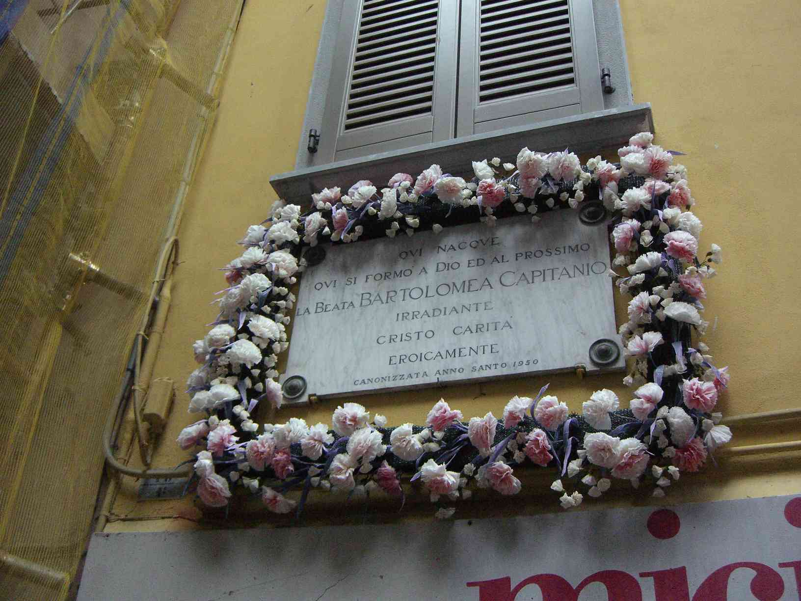 Lovere BG lapide sulla casa natale della santa Bartolomea Capitanio (1807-1833) cofondatrice con la santa Vincenza Gerosa (1784-1847) dell’Istituto delle Suore della Carità dette anche di Maria Bambina